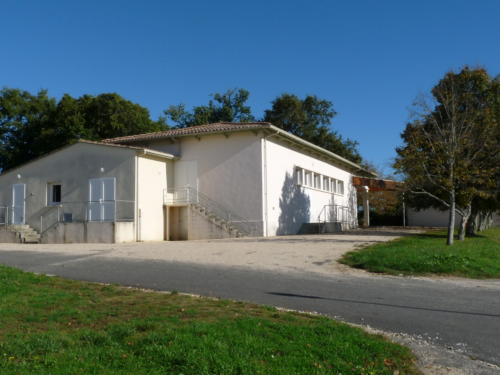 Salle des fêtes, Neuvicq, Charente-Maritime, France